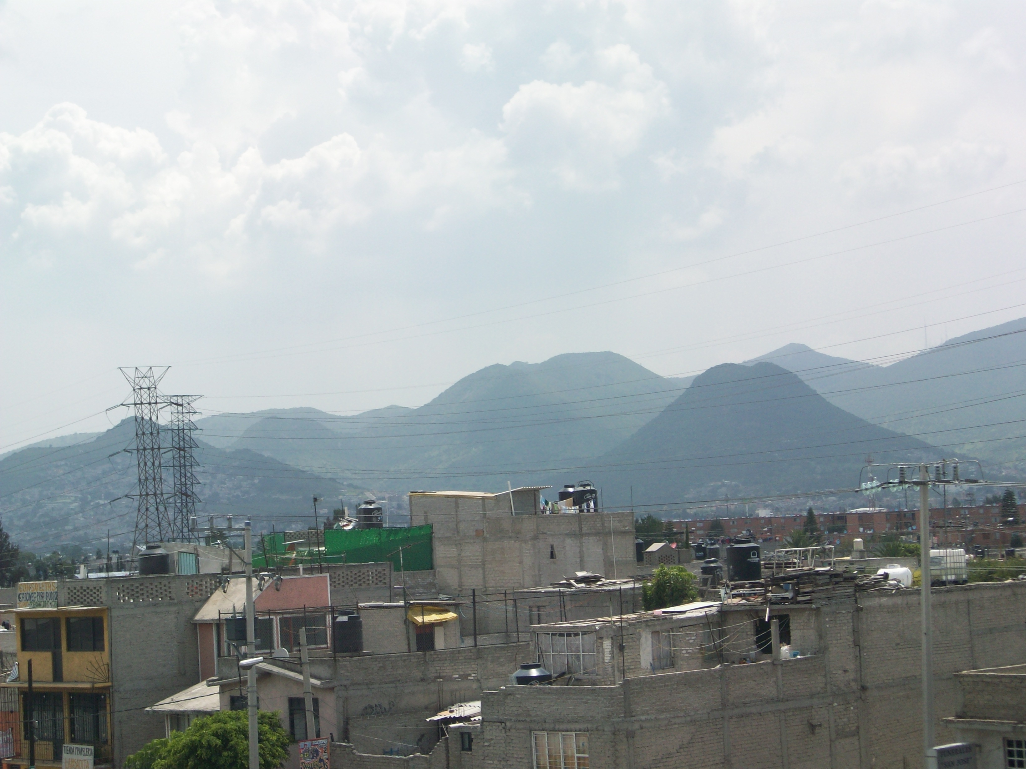 Sierra de Guadalupe